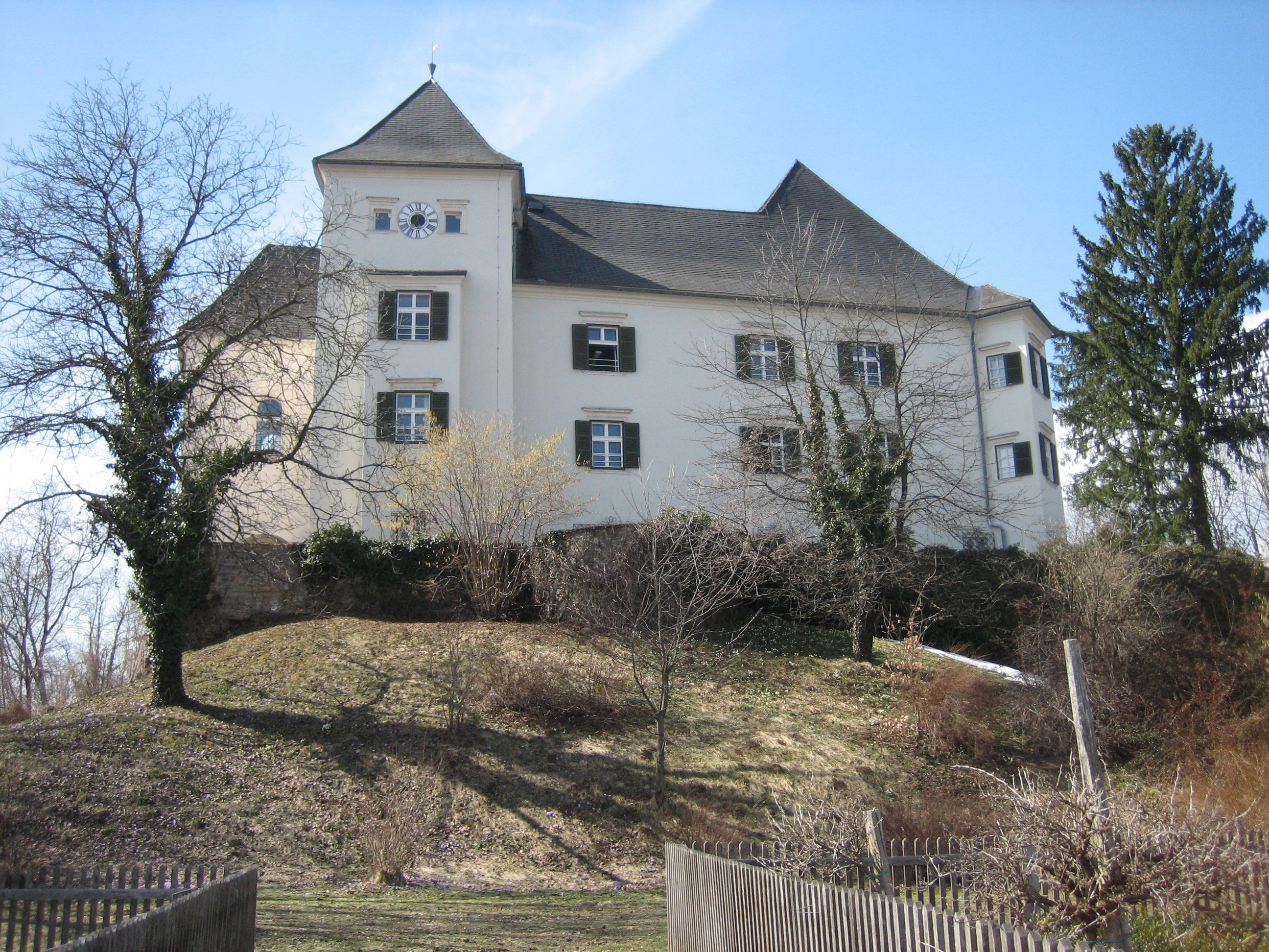 Schloss Burgstall